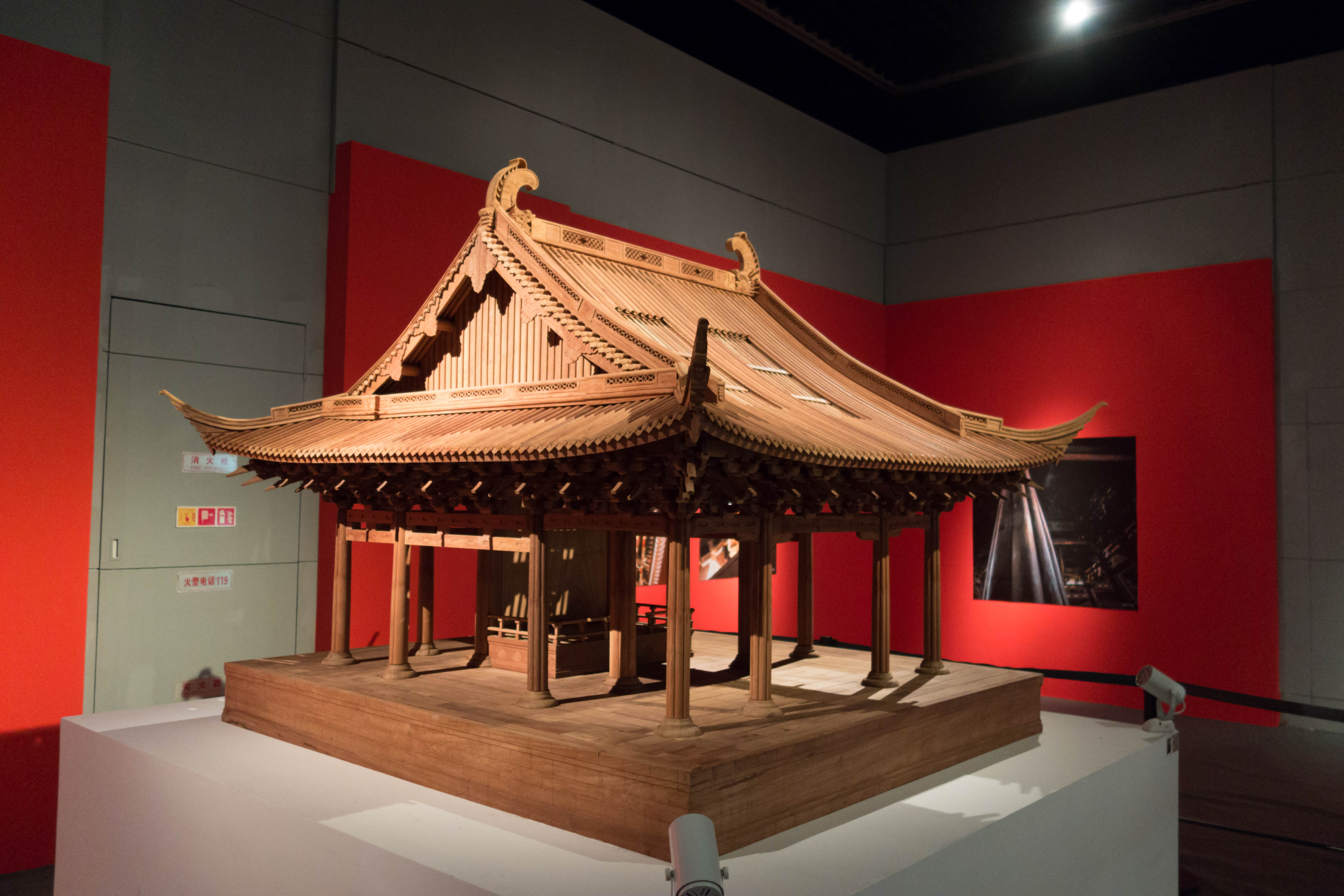 北宋保国寺大殿模型，中国文化遗产研究院使用金丝楠木制作于20世纪50年代，宁波博物馆“意匠华夏——中国古建筑经典模型展”特展展出